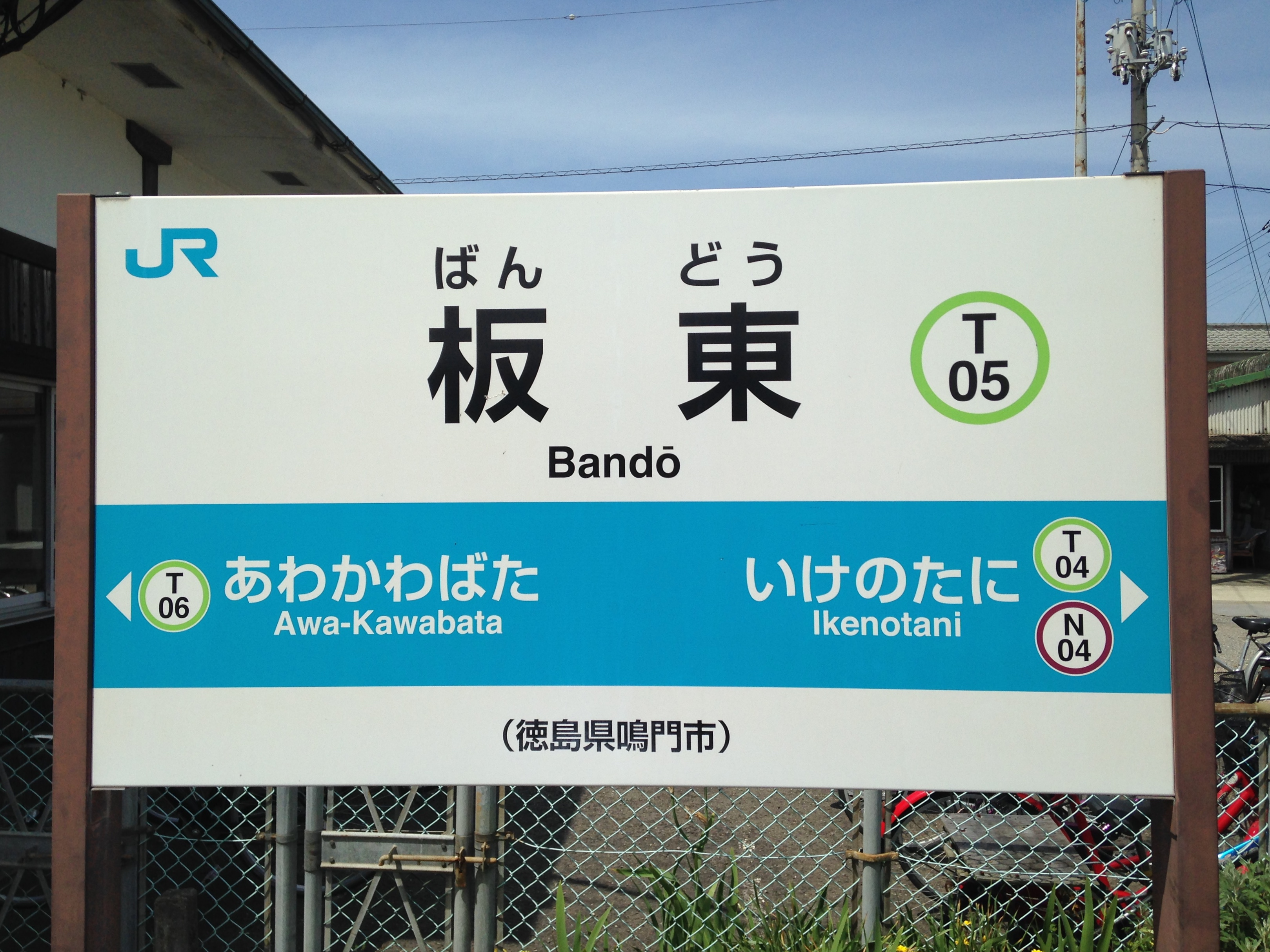 板東駅の駅名標